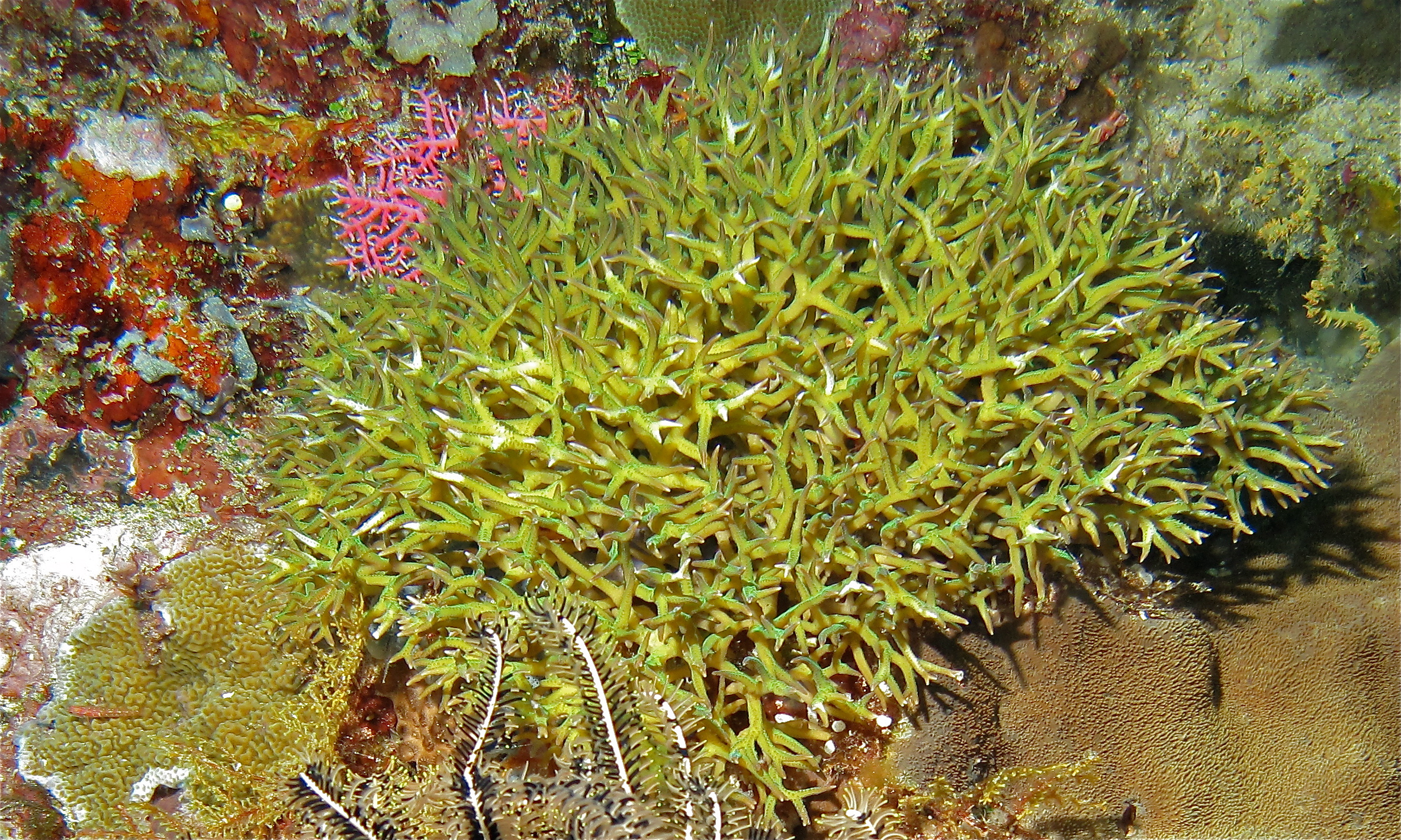 Timur II, Bunaken Island, Sulawesi, INDONESIA